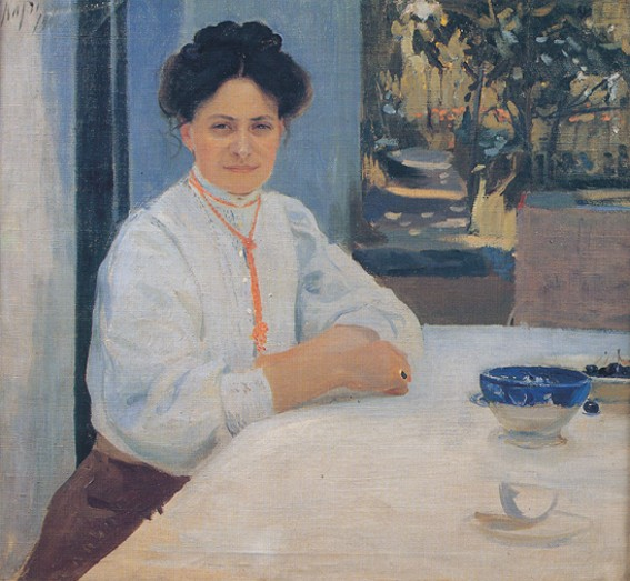 Portrait of Margareta Murashko.